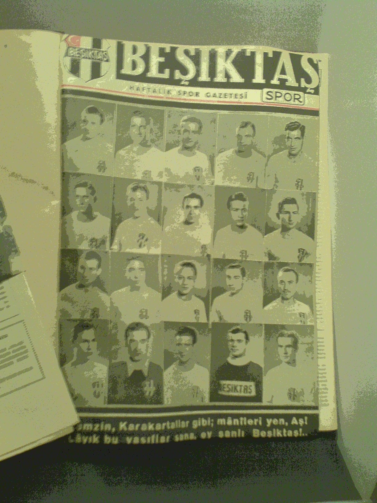 BJK müzesinda tarihi bir dergi